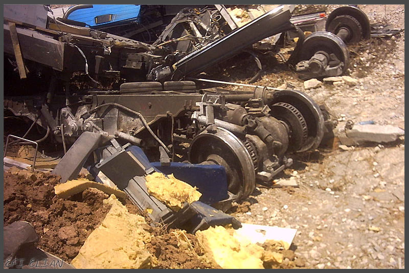 שאריות קרונוע הניהוג שנפגע בתאונת הרכבת ברבדים